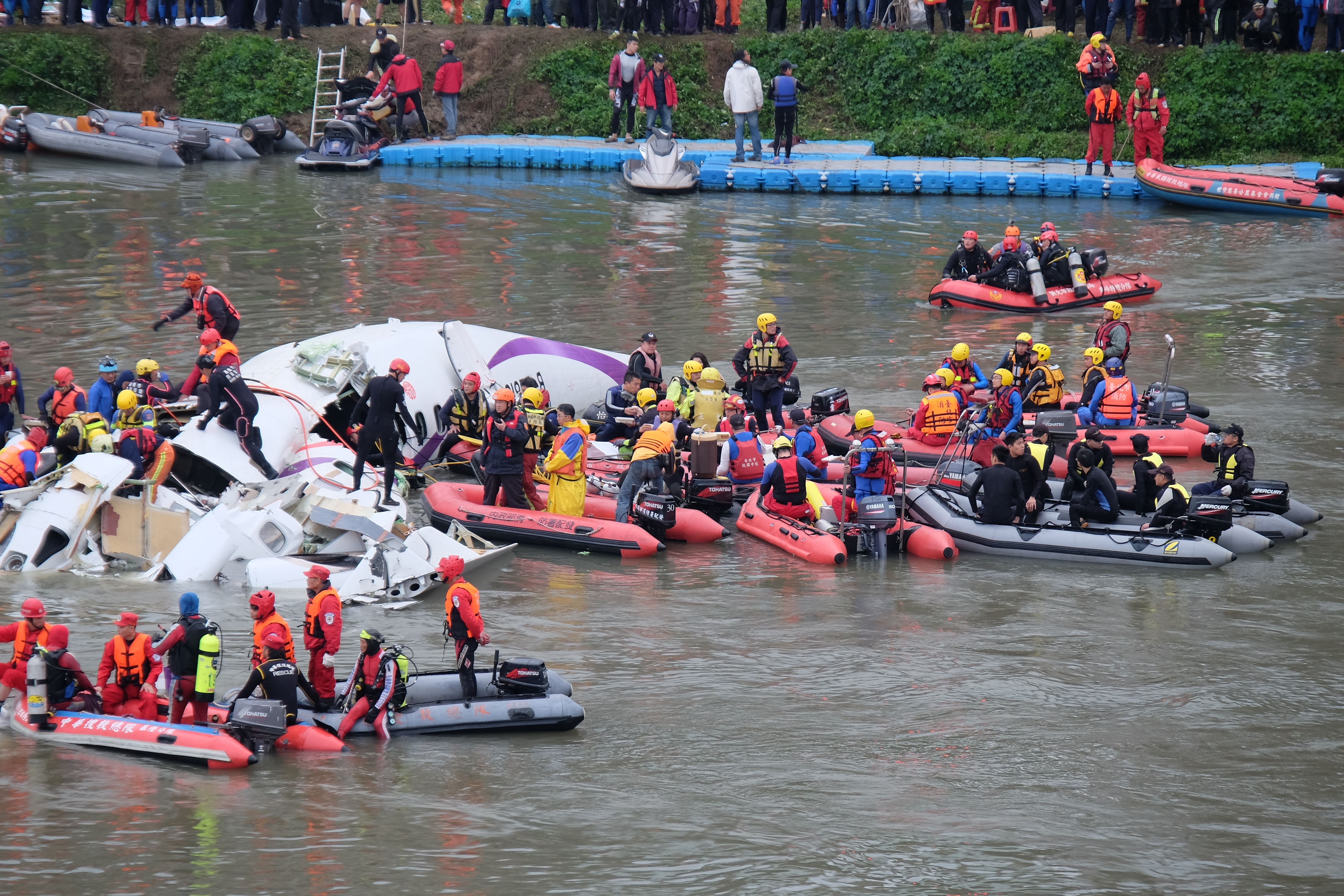 復興航空ATR 72-600 B-22816墜機救援現場機尾特寫，救難人員陸續抵達。